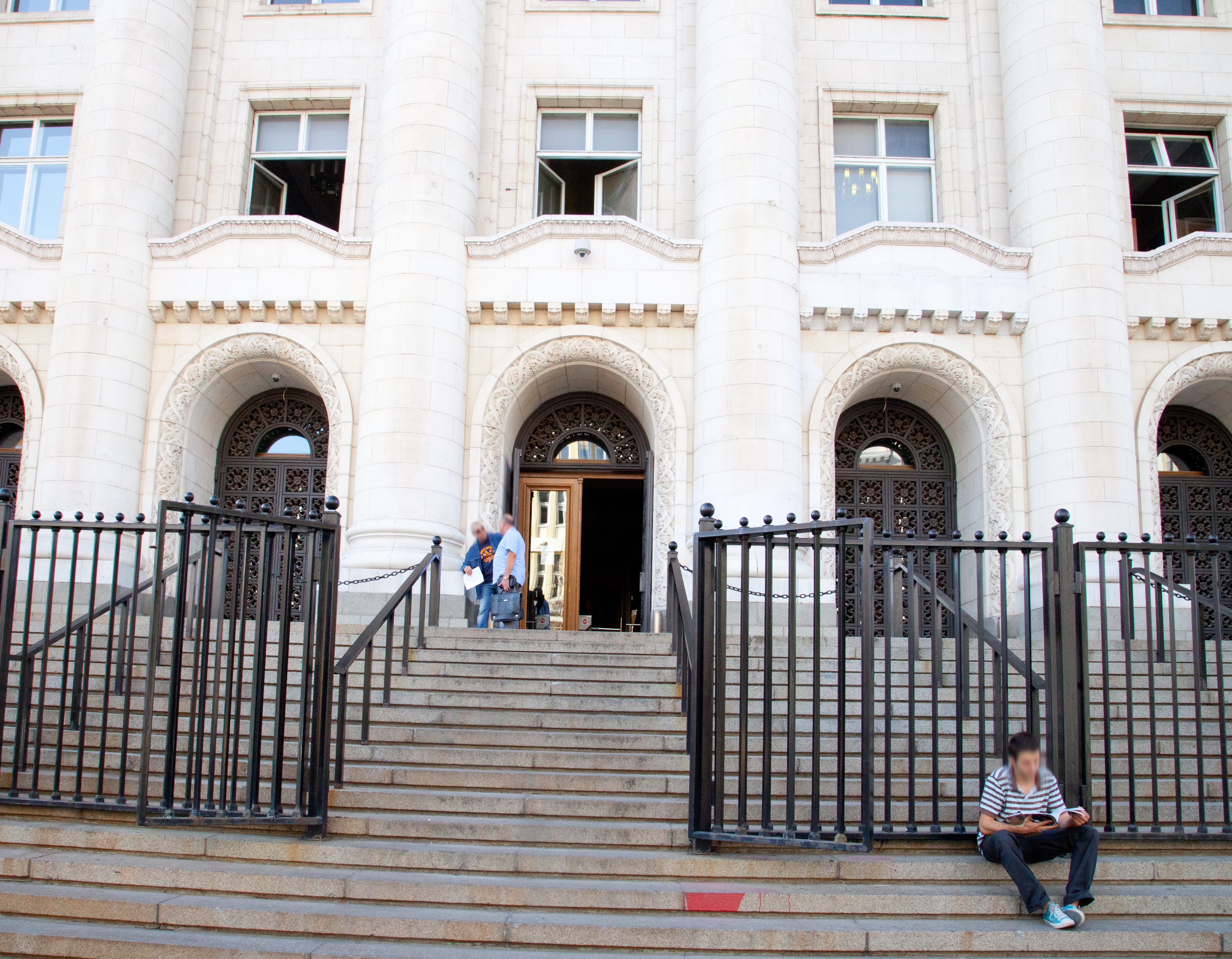 Sofia; Justizpalast